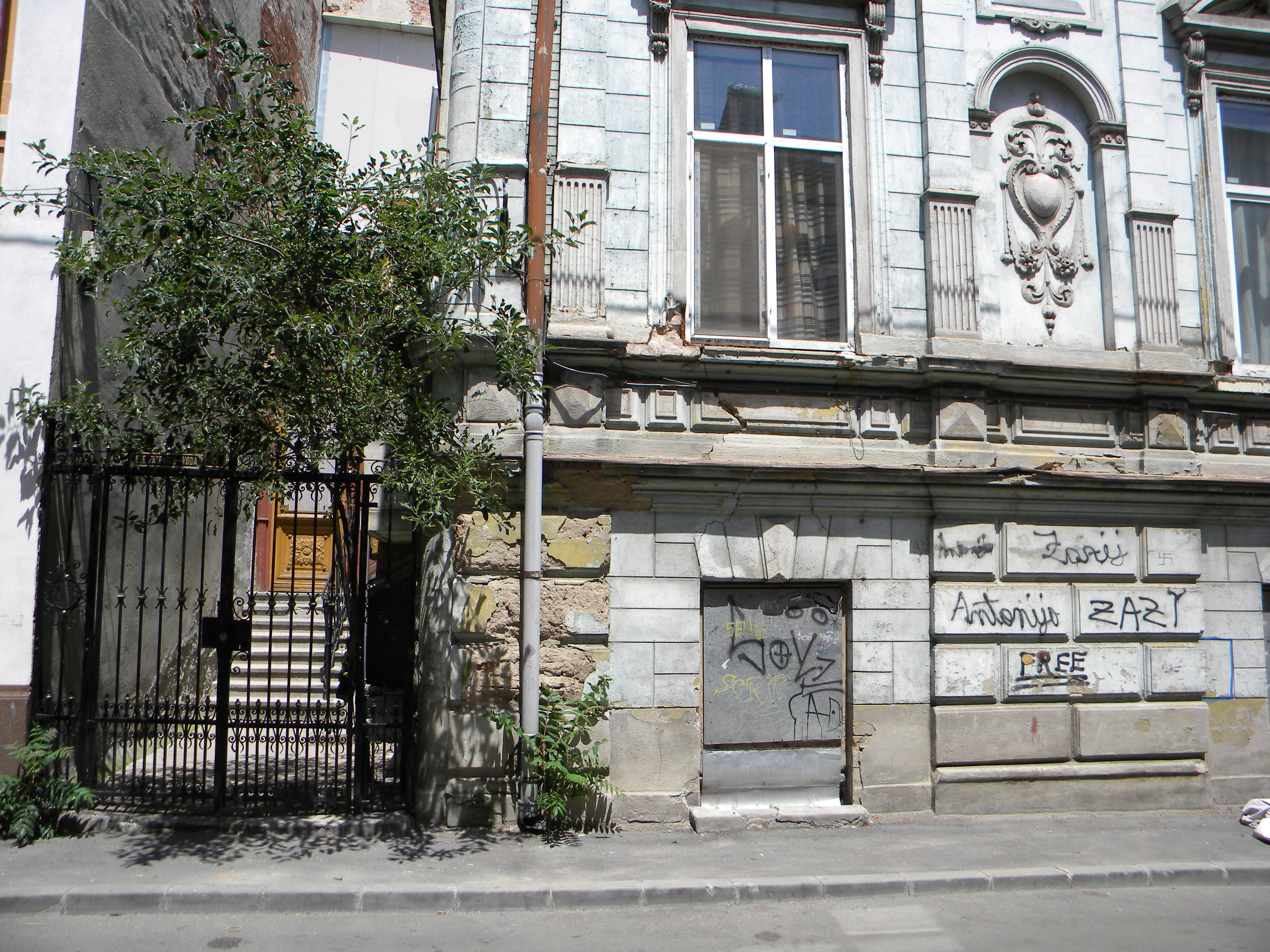 Bucuresti, Romania, Casa cu pravalie de pe Str. Patrascu Voda nr. 3; B-II-m-B-19367